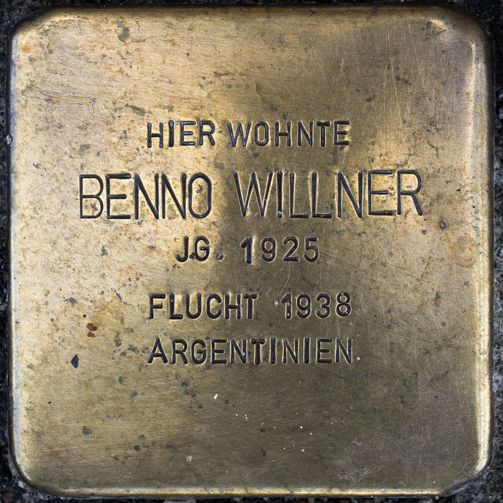 2016 Stolpersteine ToeVo Willner Benno